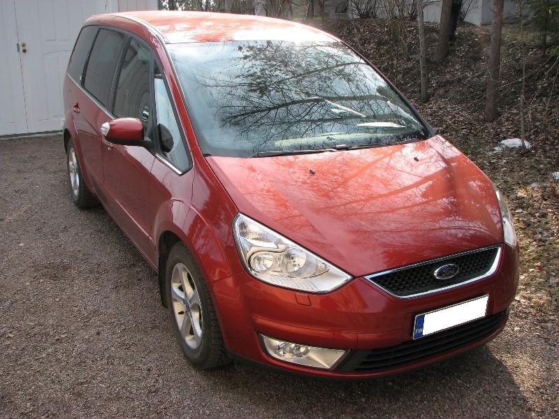 Ford Galaxy -06